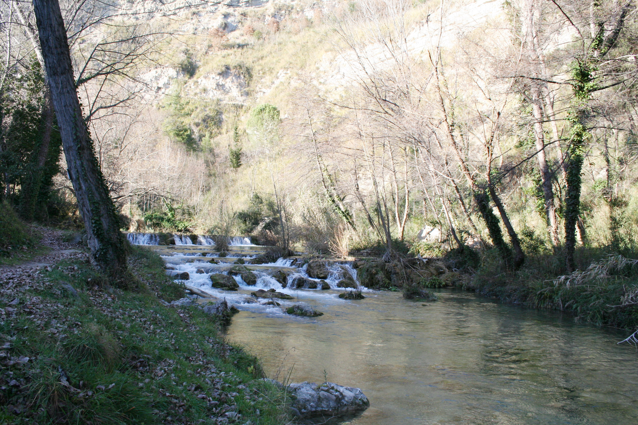 Torrente Castellano (ansa della Cartiera)